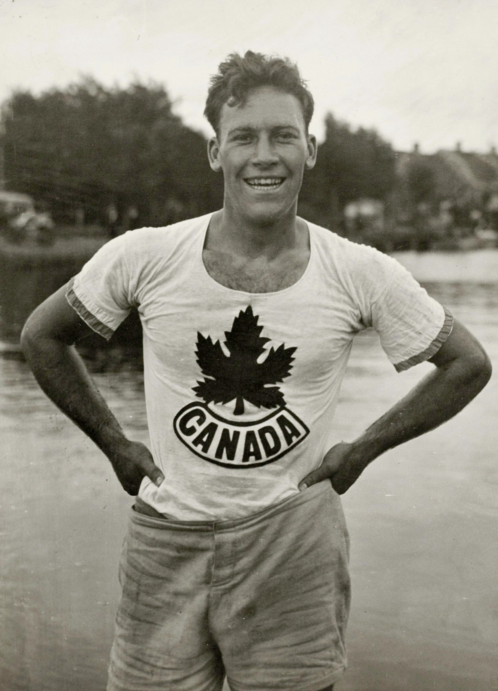 Sport, Olympische Spelen Amsterdam 1928, Roeien: Opname van de Canadese roeier Joseph Joe Wright winnaar van de zilveren medaille op het onderdeel Dubbel Twee en vijfde in het onderdeel Skiff.